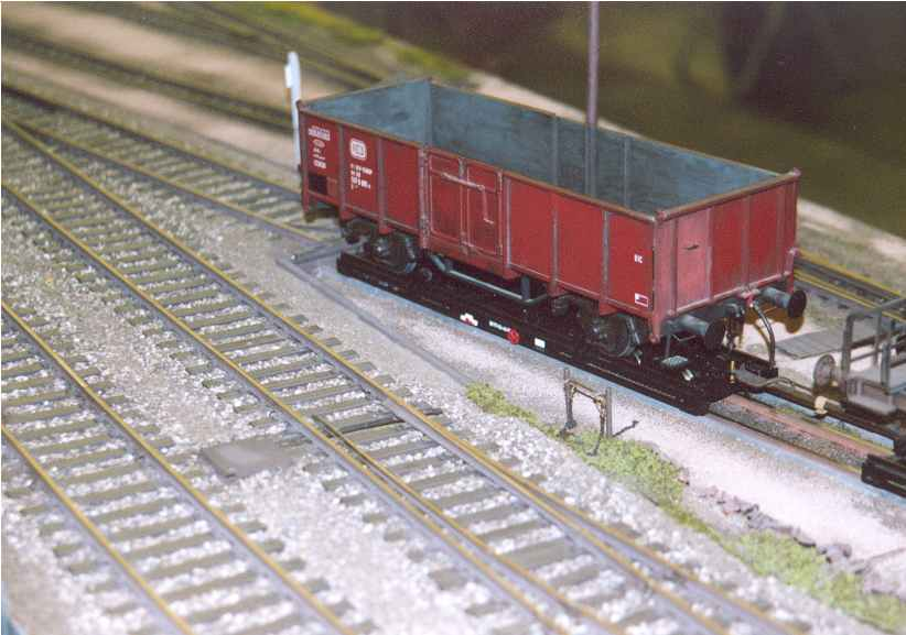 Rolwagen op de Sächsische modelspoorbaan uit Hamburg zoals hij te zien was op Eurospoor 2004 in Utrecht. Zelf gemaakte foto